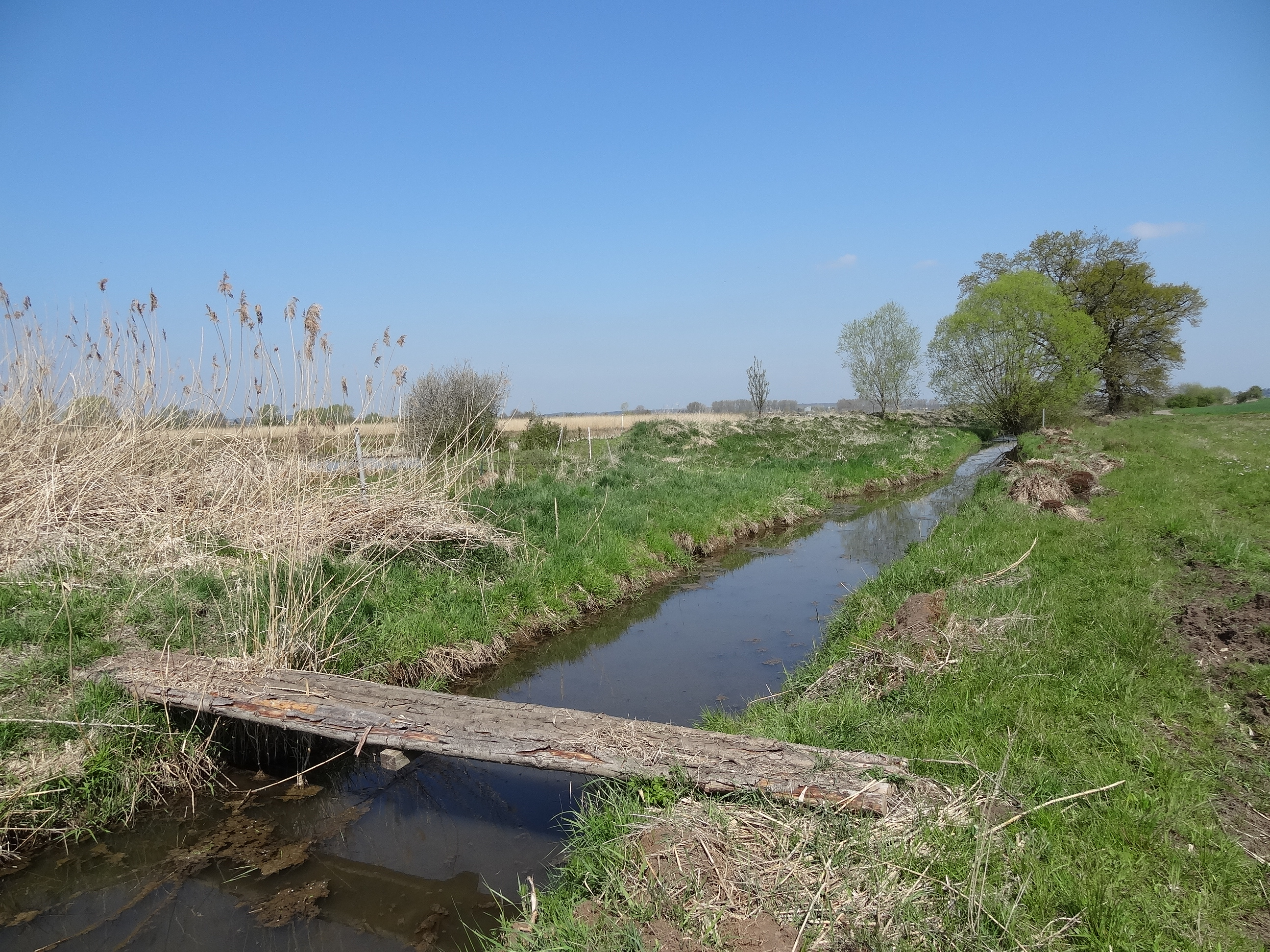 Weidgraben an der mittleren Horloffaue, im Hintergrund das Naturdenkmal Eiche an der Kuhweide